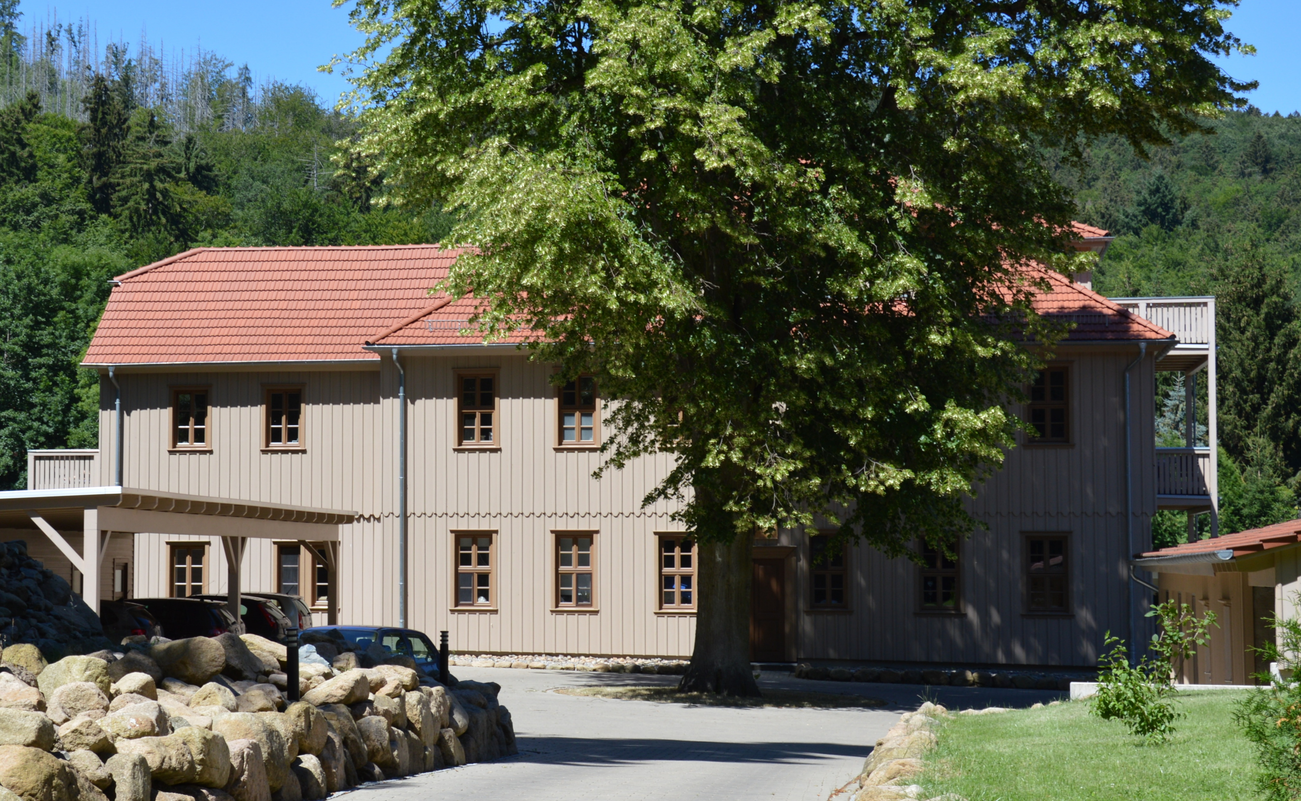 Ilsetal 2